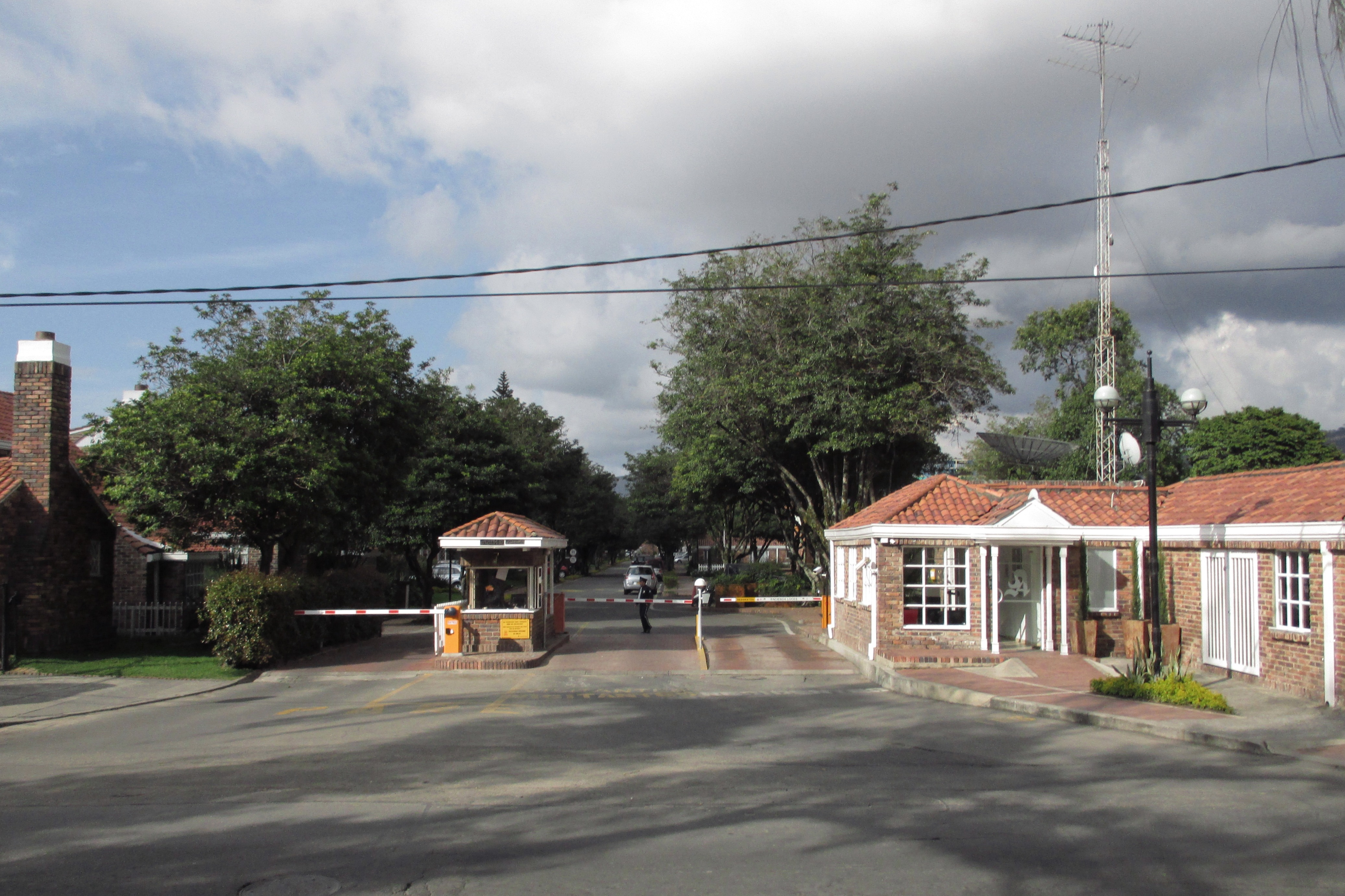 Bogotá